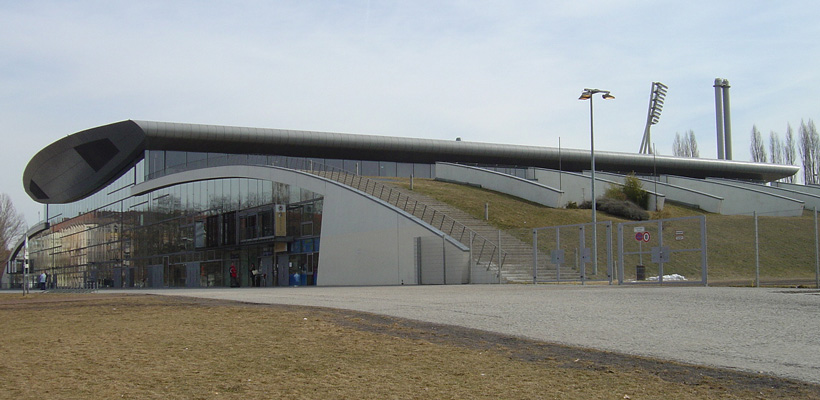 Max-Schmeling-Halle, Prenzlauer Berg, Berlin, Germany